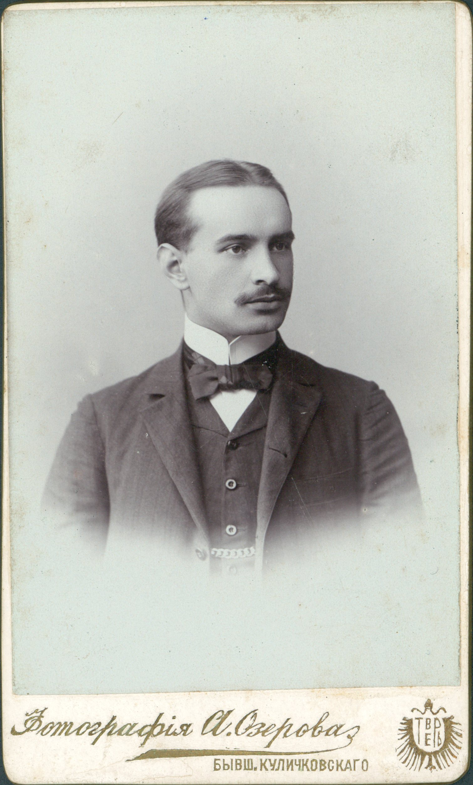 Henryk Bursche